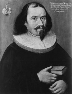 Gemälde in der Tübinger Professorengalerie